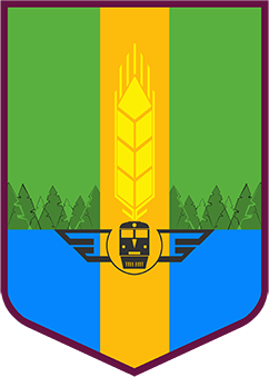 Чотирикутний з гострою підставою щит (традиційний англійський) з малиновим підґрунтям. По центру щита вертикально розміщено хлібний колос на золотому фоні, по горизонталі – сосновий ліс на зеленому фоні. В центрі підстави – локомотив та крила (у малюнку чорного кольору). Малинове підґрунтя щита – малиновий - основний колір Прапору Ізюмського слобідського козачого полку того часу, коли козацтво охороняло хліборобів від набігів спустошувачів та руйнівників, побудувавши укріплення, що поклали початок заснуванню перших населених пунктів ОТГ козаками цього з’єднання. Зелений колір з векторним зображенням соснового лісу – красота регіону, особливість ландшафту та наявність лікувальних факторів природного характеру. Синій колір – велика кількість водойм. Схематичне зображення хлібного колосу на золотому фоні – визначає статус регіону як сільськогосподарського з великою кількістю родючих земель та розвинутою галуззю агропромислового комплексу. Локомотив та схематичне зображення емблеми залізниці «крил» – визначає підприємства залізничного транспорту – головну бюджетоутворюючу галузь ОТГ, основу її фінансового благополуччя.